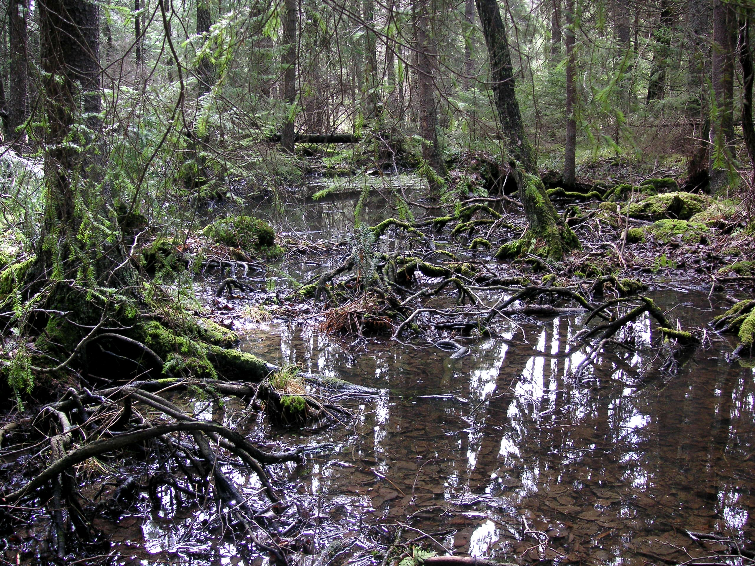 Fullersta kvarn, sumplövskog i Gömmarens naturreservat i Huddinge kommun